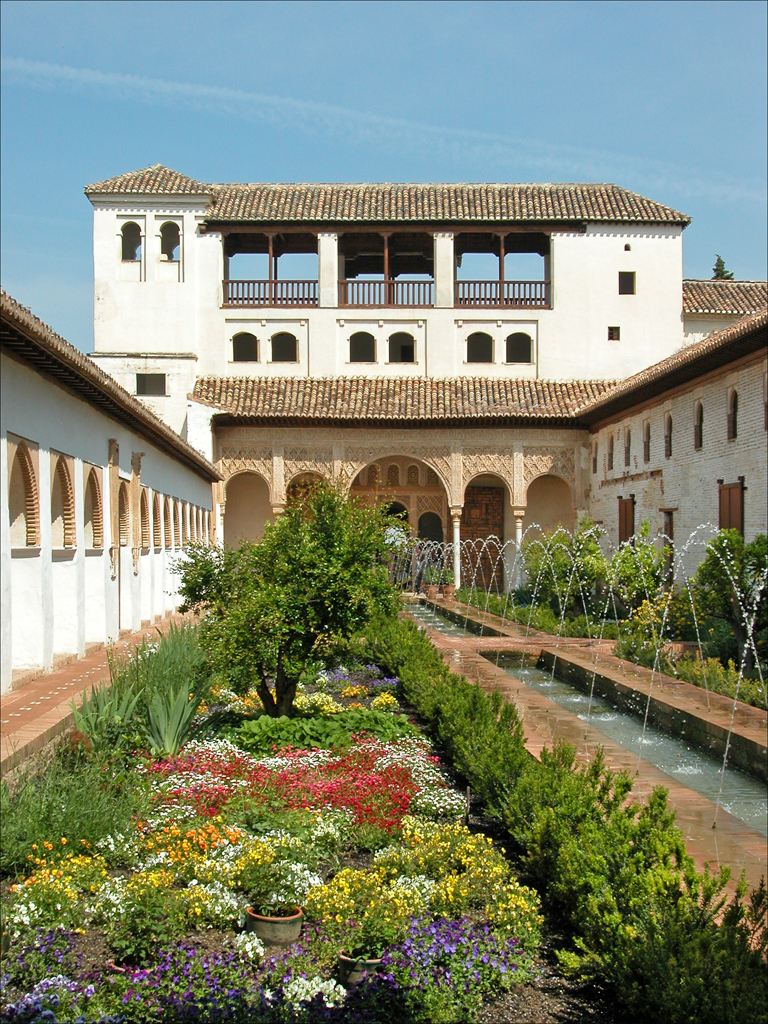 Les jardins du Generalife ont été reconstitués dans le respect de la tradition. Site de l'auteur sur l'Andalousie